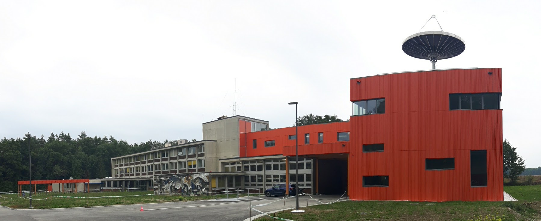 L'observatoire de Genève à Sauverny, dont le nouveau bâtiment "Astrotech" à droite.